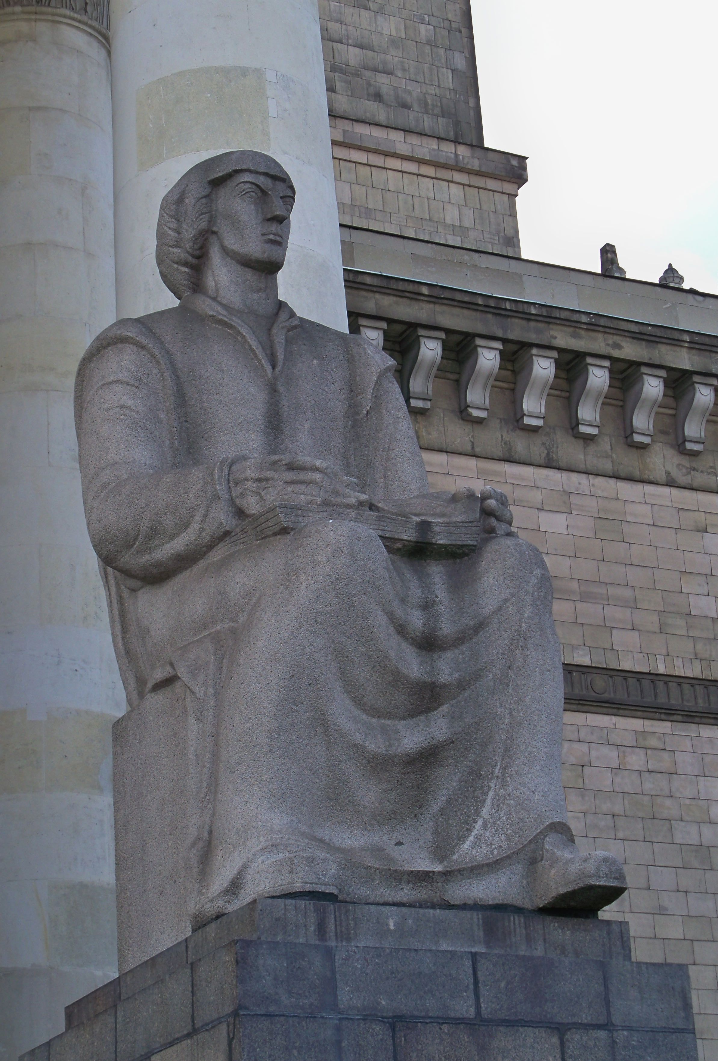 Jedna z socrealistycznych rzeźb wokół Pałacu Kultury i Nauki w Warszawie – Mikołaj Kopernik reprezentujący naukę z prawej strony wejścia głównego